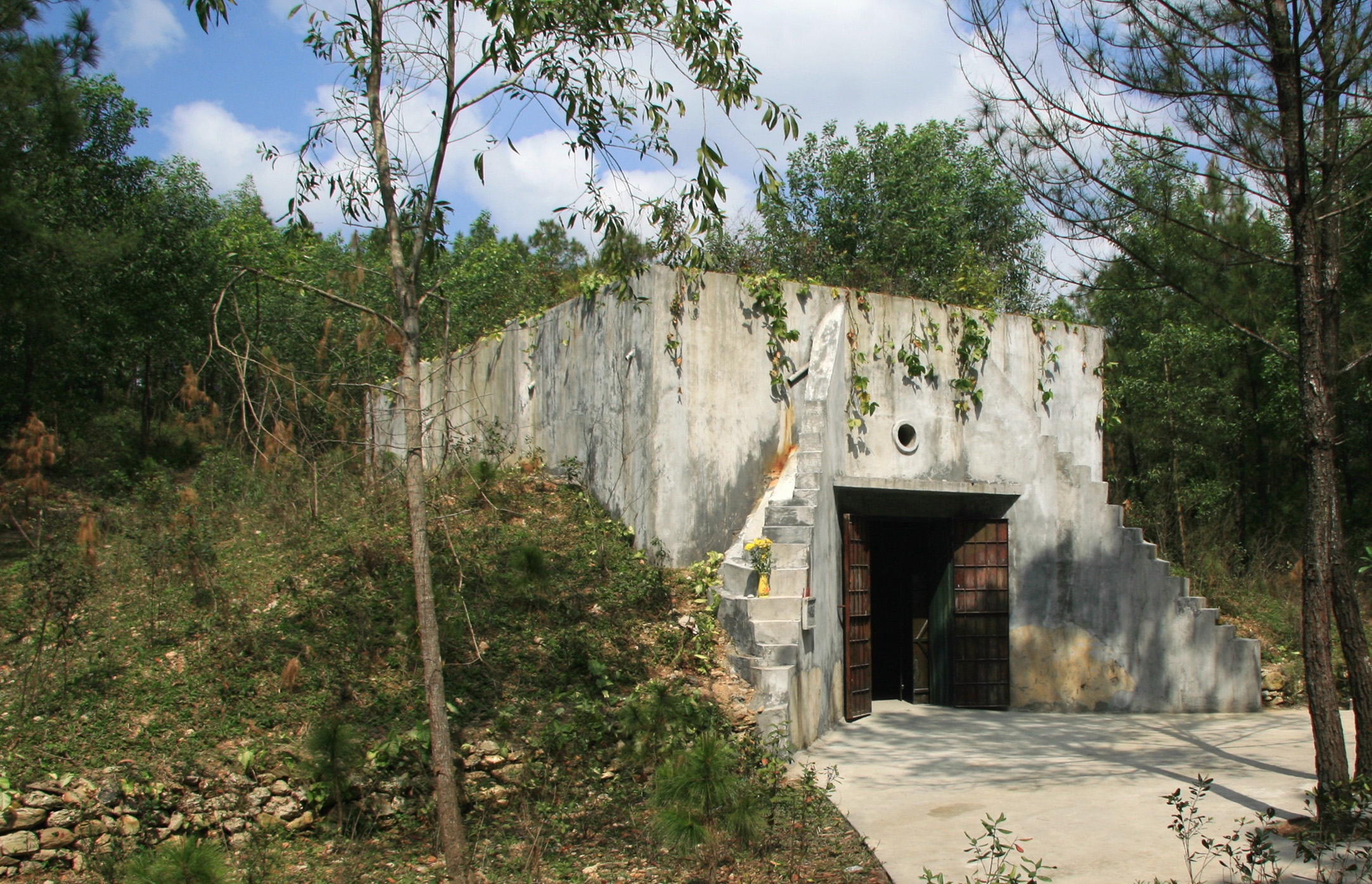 Chứng tích hầm số 9 tại khu vực Chín Hầm